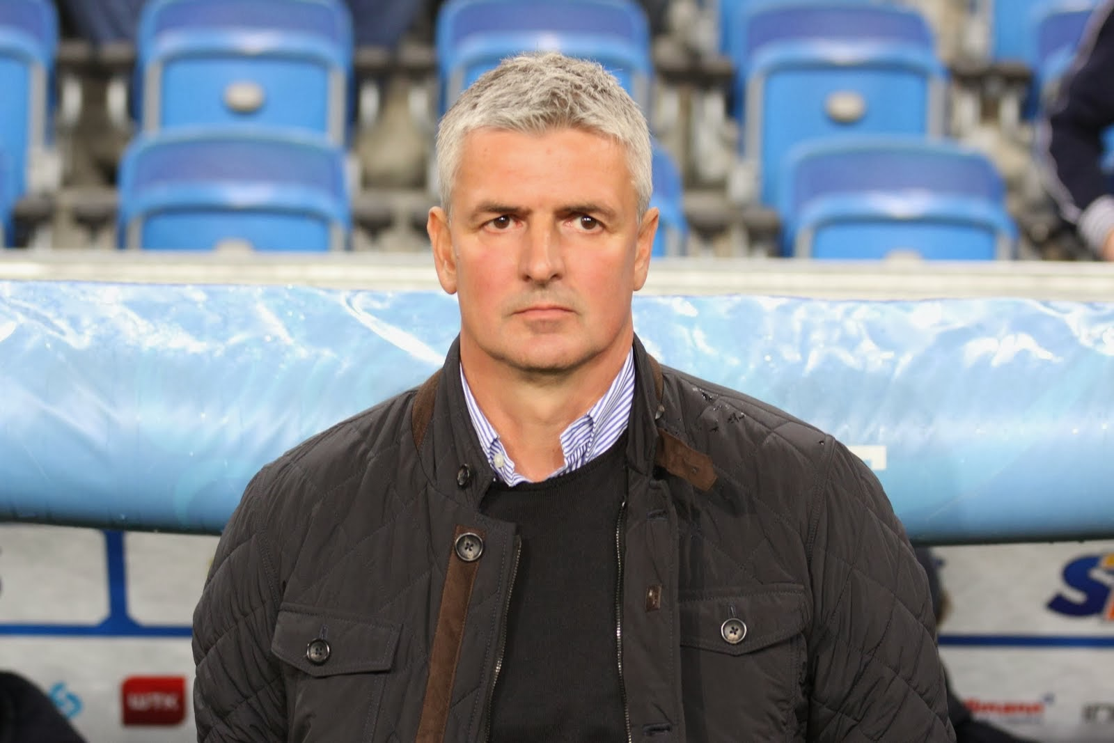 Dariusz Wdowczyk w roli trenera Pogoni Szczecin